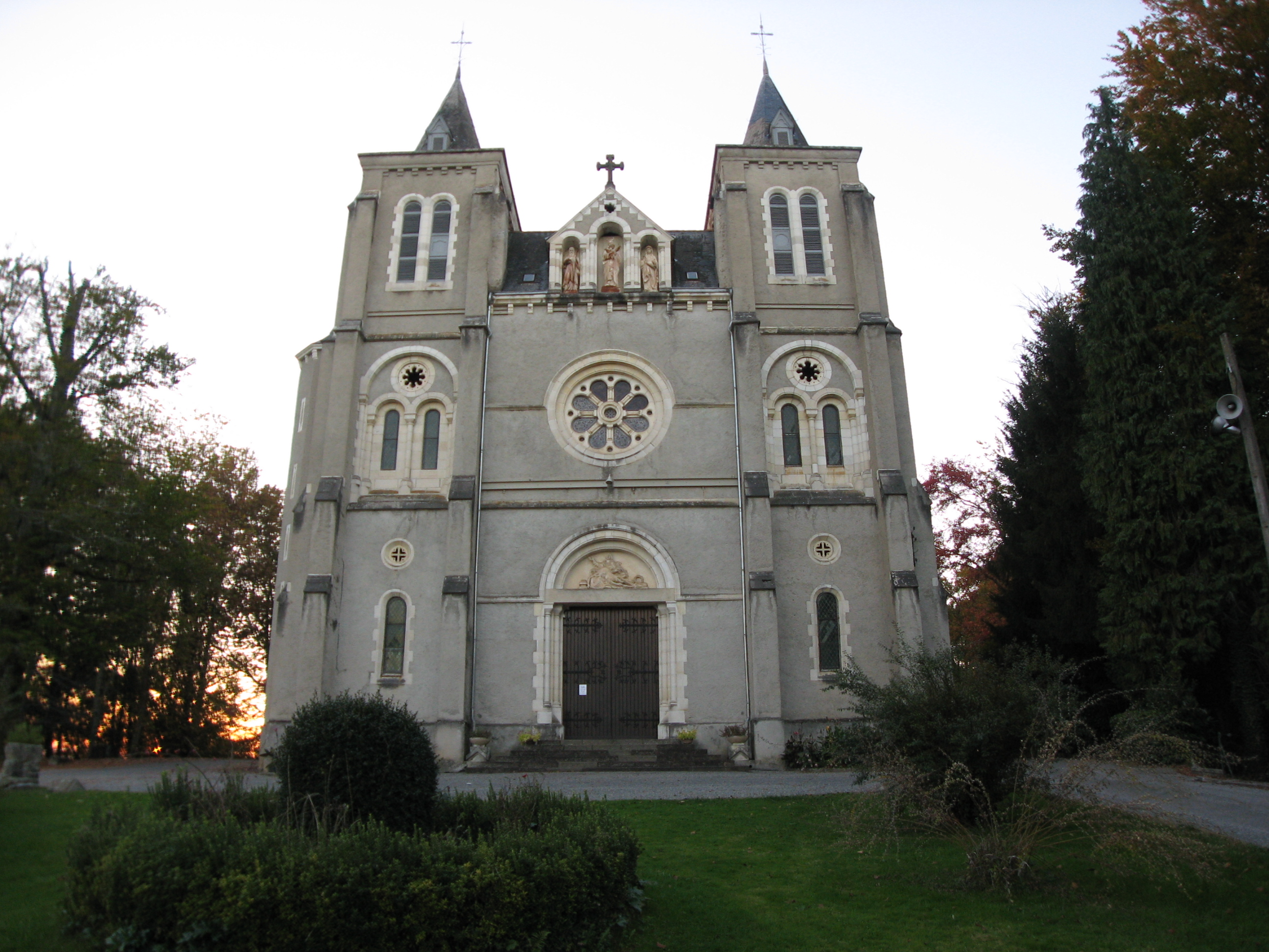 Chapelle de Pietat à pardies-Pietat (Pyrénées).